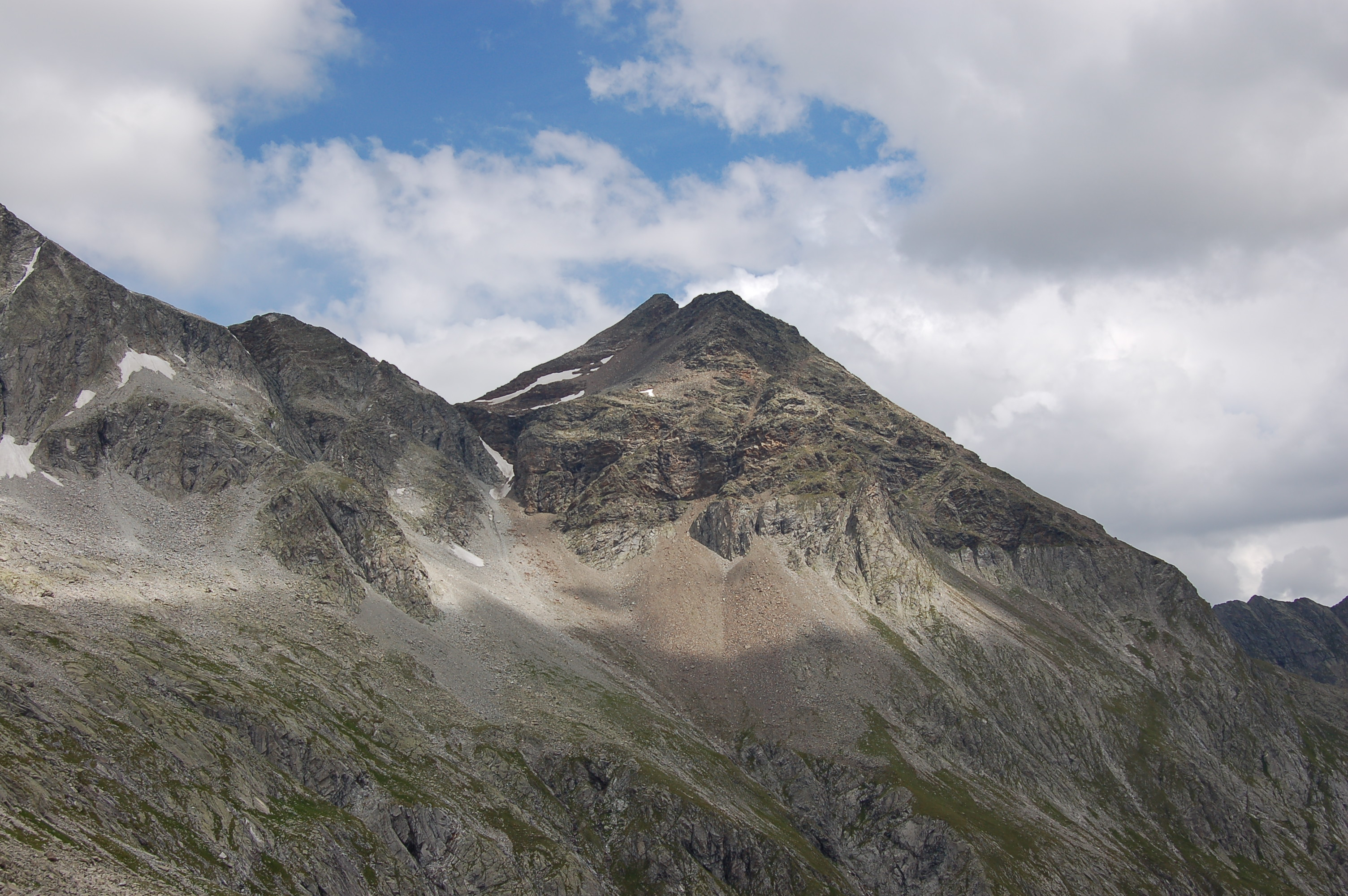 Roßhorn, von der alten Barmer Hütte